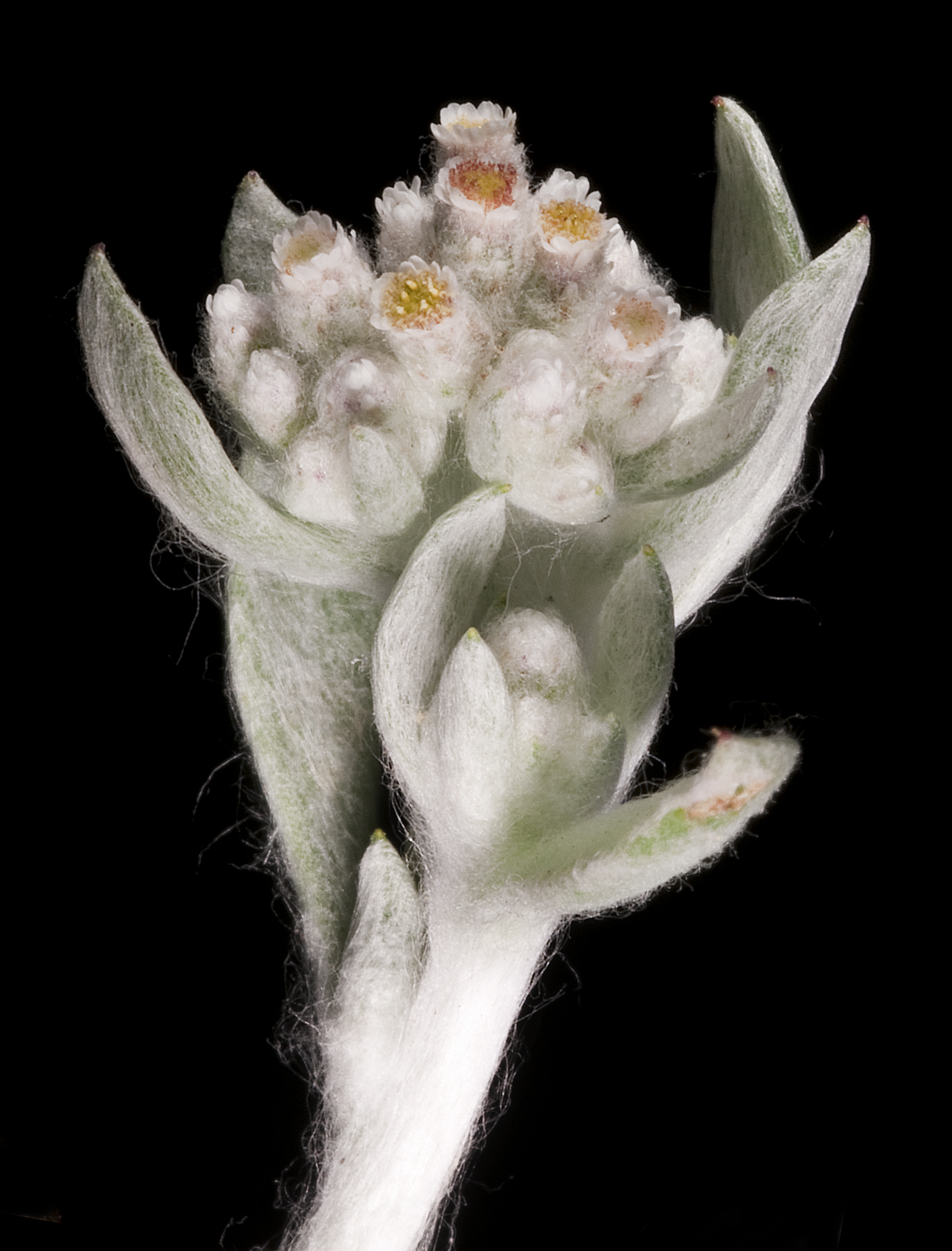 KRT4067